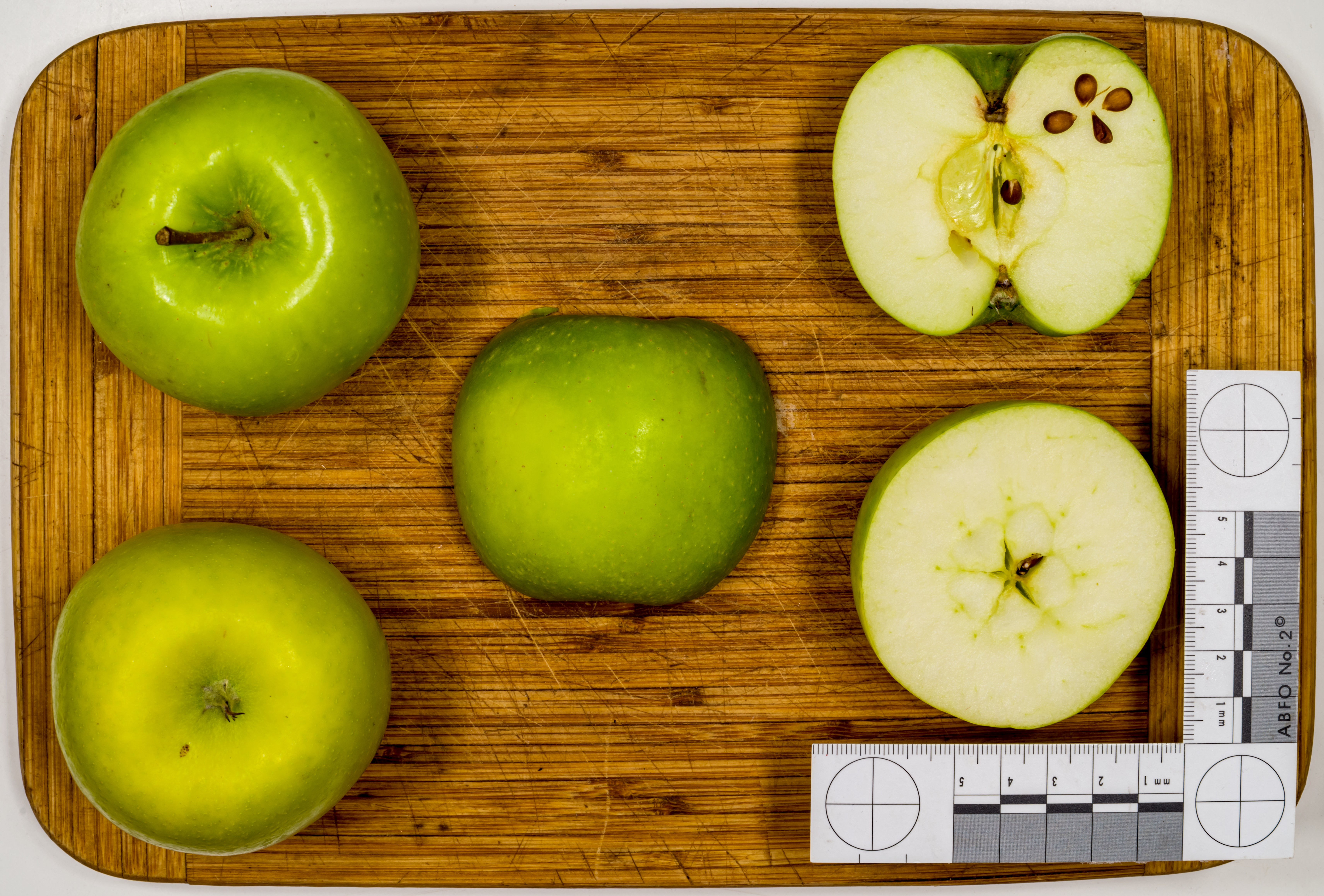 Apfelsorte:Nicogreen, Greenstar, Züchtung 1989 in Belgien